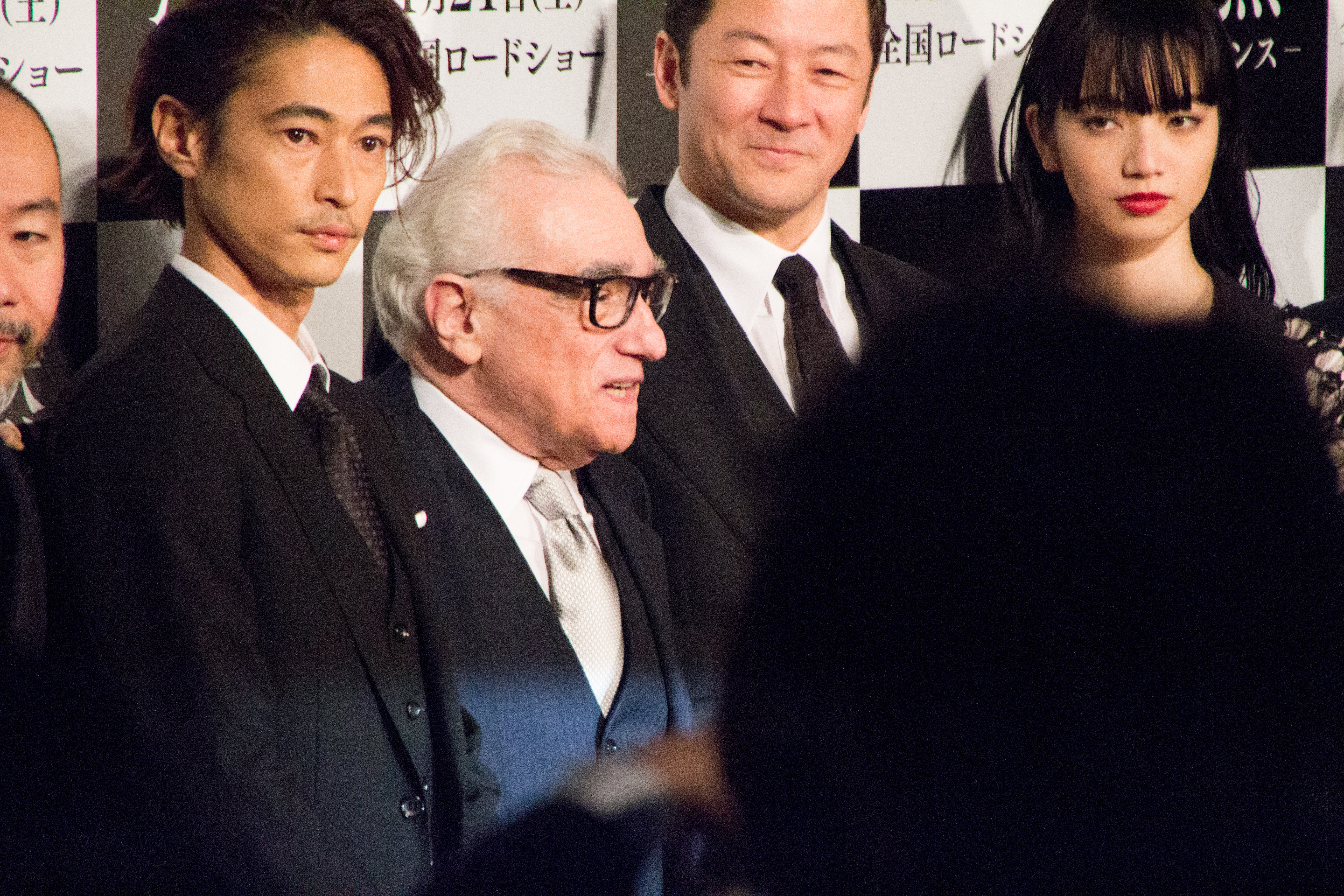 沈黙 ジャパンプレミア 窪塚洋介 マーティン・スコセッシ 浅野忠信 小松菜奈